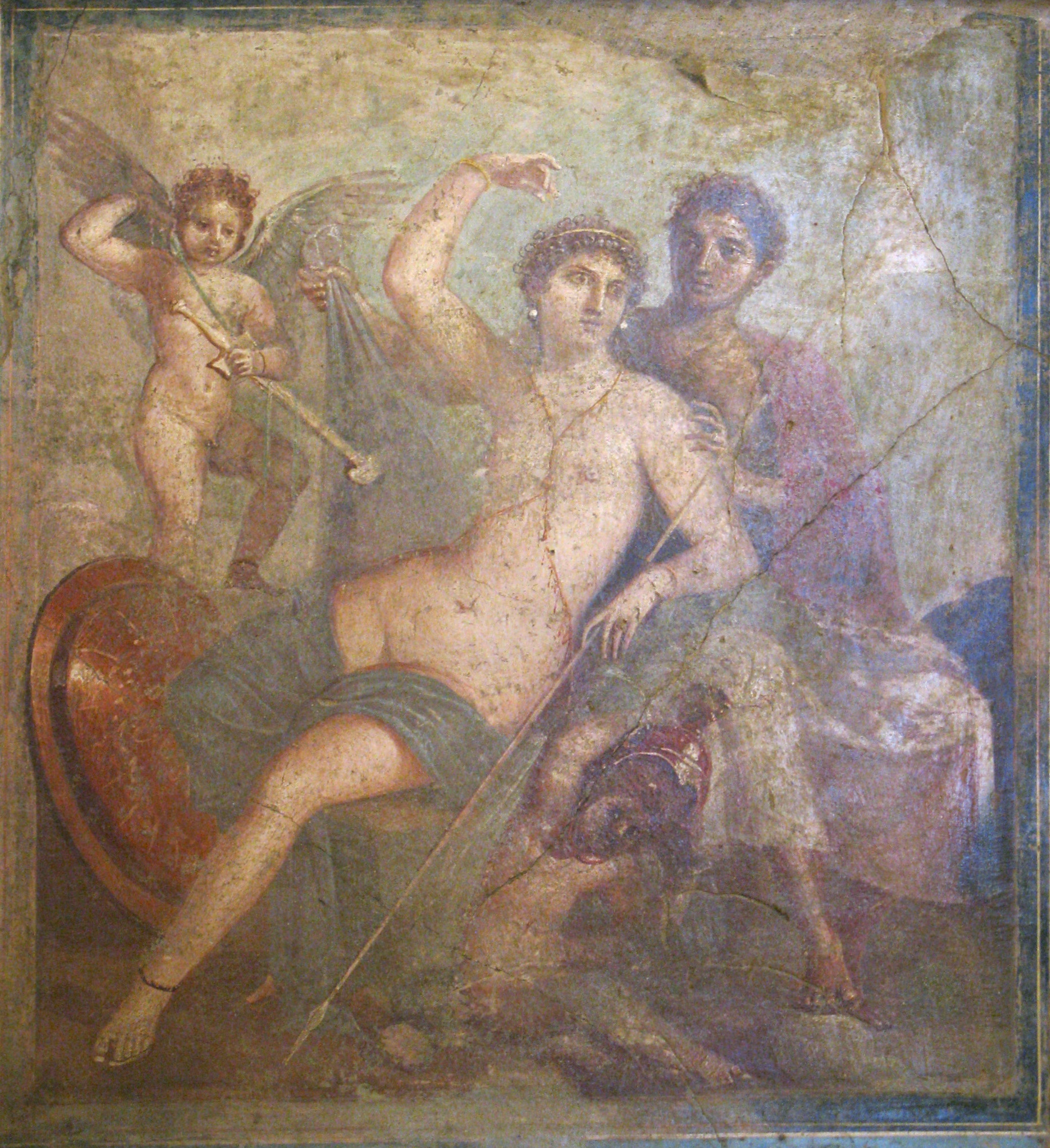 Ares e Afrodite, Museo archeologico nazionale di Napoli, (inv. nr. 9248). Da Pompei, Casa delle Nozze di Ercole (o Casa di Marte e Venere). Marte solleva il manto azzurro di Venere, per ammirarne la nudità caratterizzata solo da una catena d'oro disposta ad X. Caratteristica è la rappresentazione dei due sessi che prevede una carnagione bruna per l'uomo e chiara e delicata per la donna. Due amorini giocano con le armi di Marte. Lo scudo e l'elmo rimandano riflessi di luce.